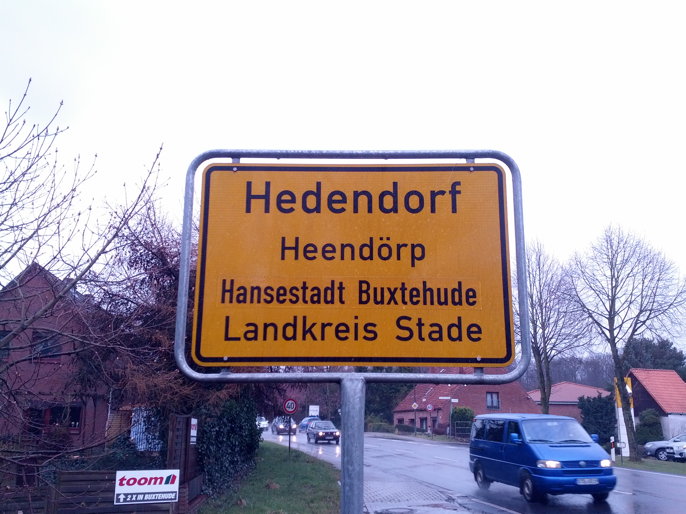 Oortsschild mit den Naam op Hoochdüütsch un op Plattdüütsch